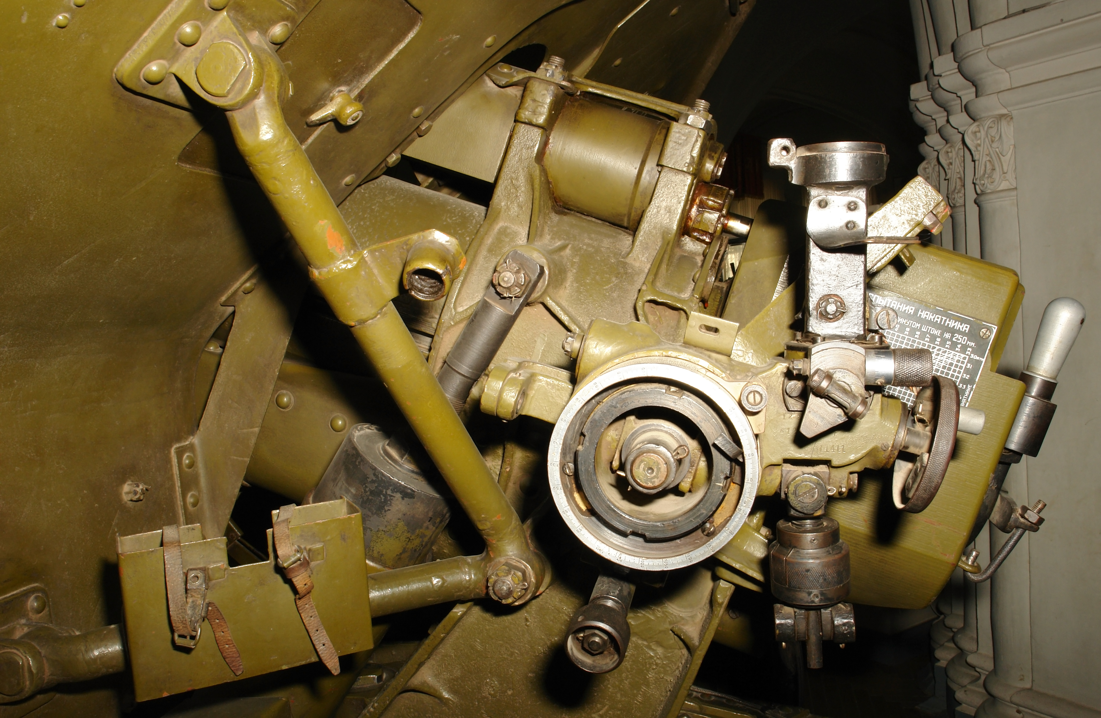 122-мм ГАУБИЦА обр. 1938 г. № 12671. Воины-патриоты 5-й батареи 162-го артиллерийского полка одними из первых на Ленинградском фронте внесли свои сбережения в фонд обороны Родины и попросили изготовить для них четыре орудия. 23 февраля 1944 г., в день 26-й годовщины Советской Армии, в районе г. Нарвы четыре орудия, в том числе и гаубица № 12671, вместе с поздравительной телеграммой Верховного Главнокомандующего были вручены патриотам-артиллеристам. В этот день батарейцы капитана М. М. Лободзинского дали из этих гаубиц первый залп по врагу. До конца войны из гаубиц было выпущено 8000 снарядов, уничтожено сотни гитлеровцев, 10 орудий, 8 минометных батарей, 25 пулеметов, 15 автомашин, разрушено 13 дзотов. Военно-исторический музей артиллерии, инженерных войск и войск связи, Санкт-Петербруг.